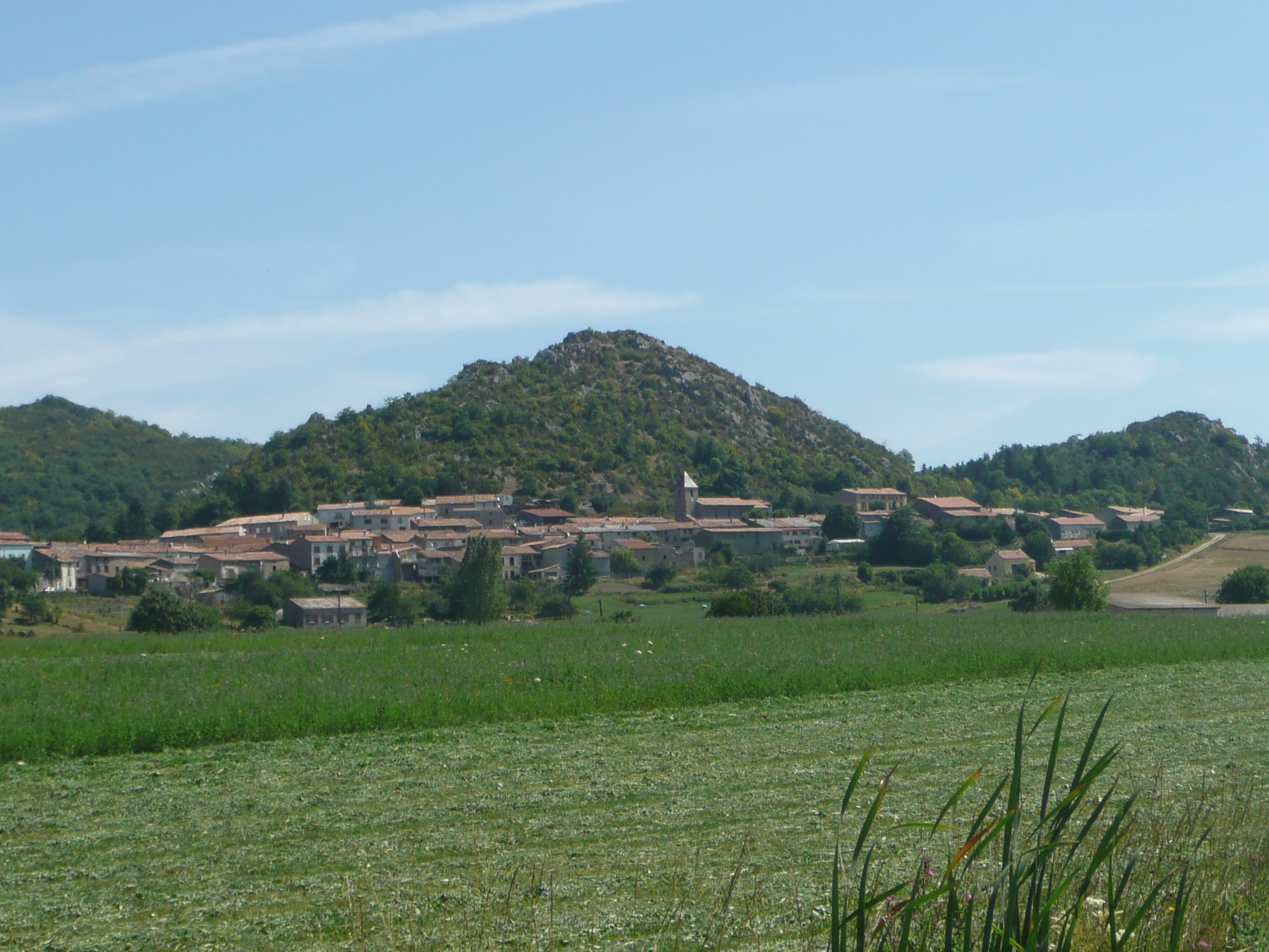 Vue générale du village de Belvis, Aude